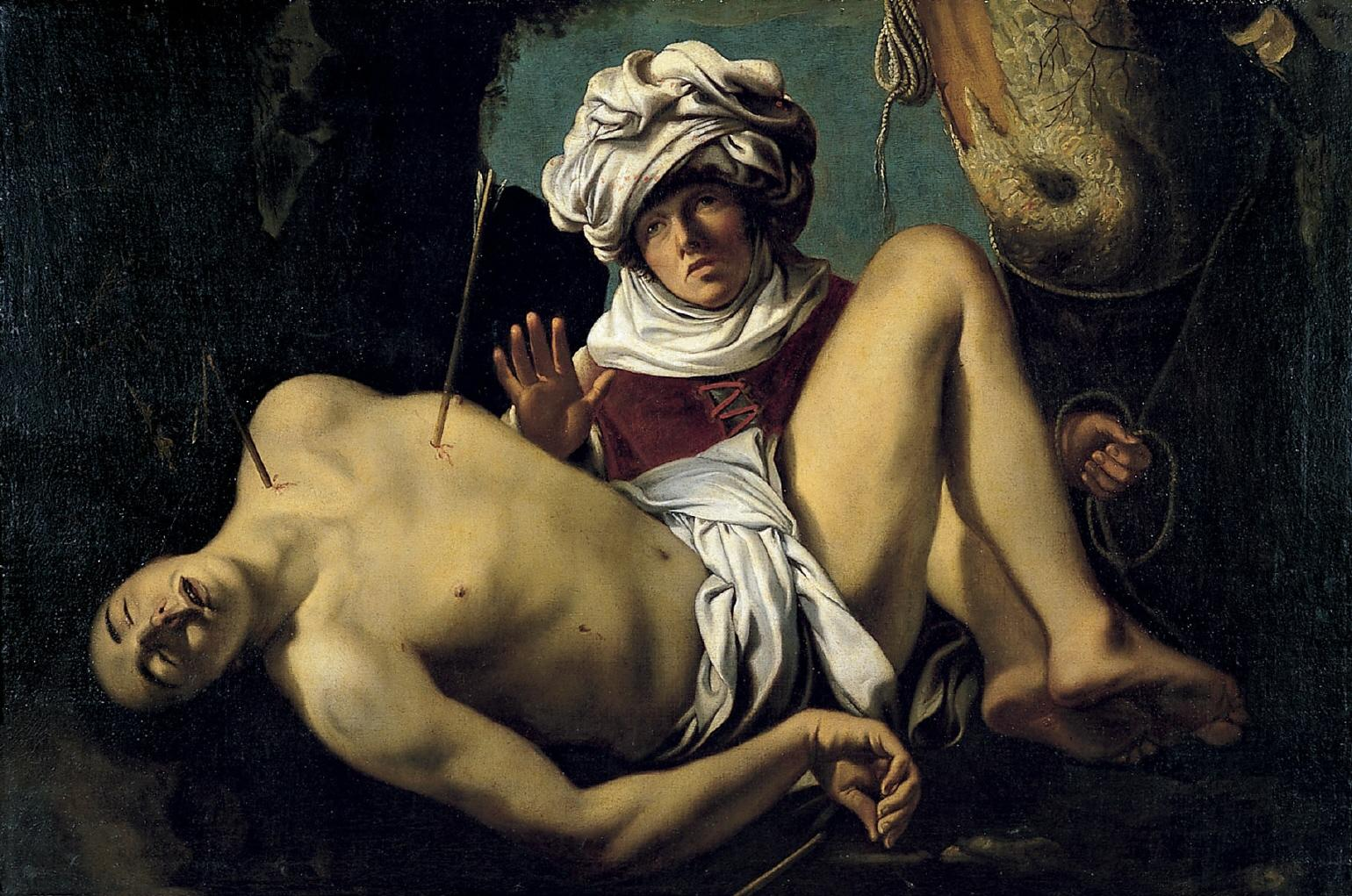 La obra representa al mártir San Sebastián siendo atendido por Santa Irene.